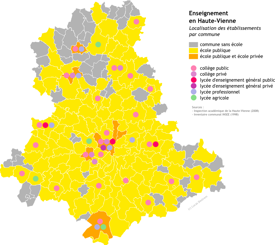 Carte des établissements d'enseignement en Haute-Vienne